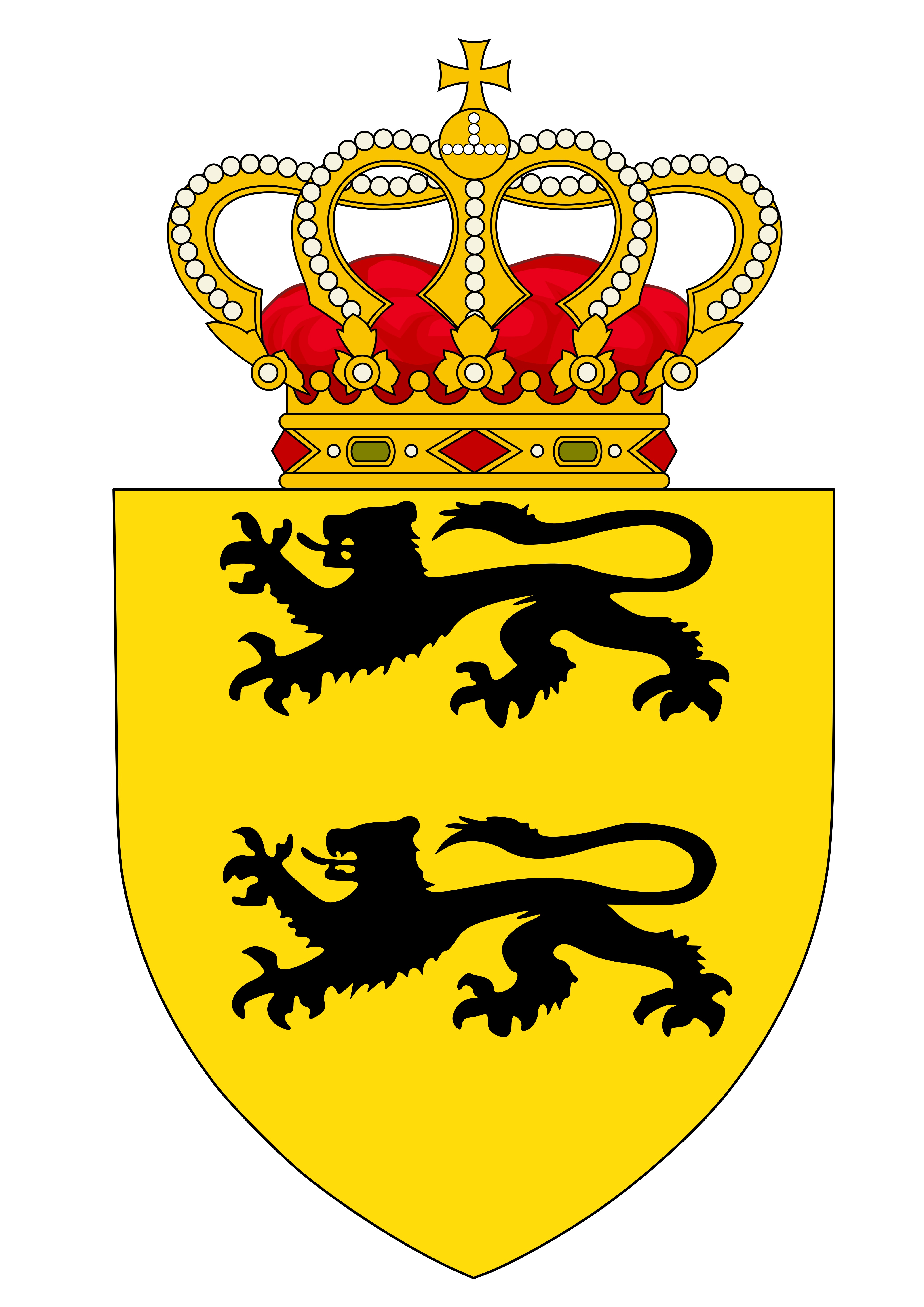 Wapenschild van de micronatie Flandrensis: gepubliceerd in Het Belang van Limburg en Gazet van Antwerpen